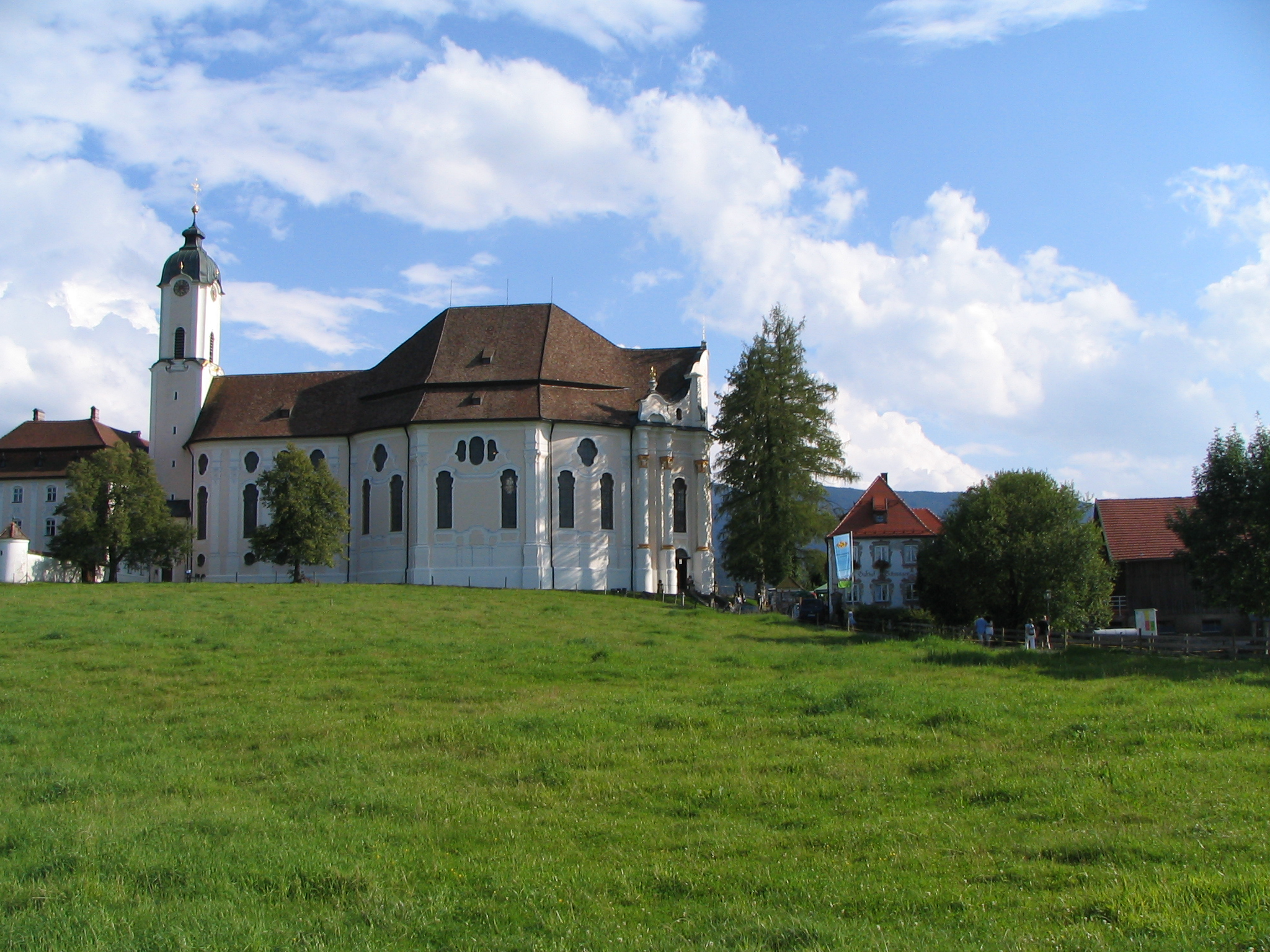 Wieskirche